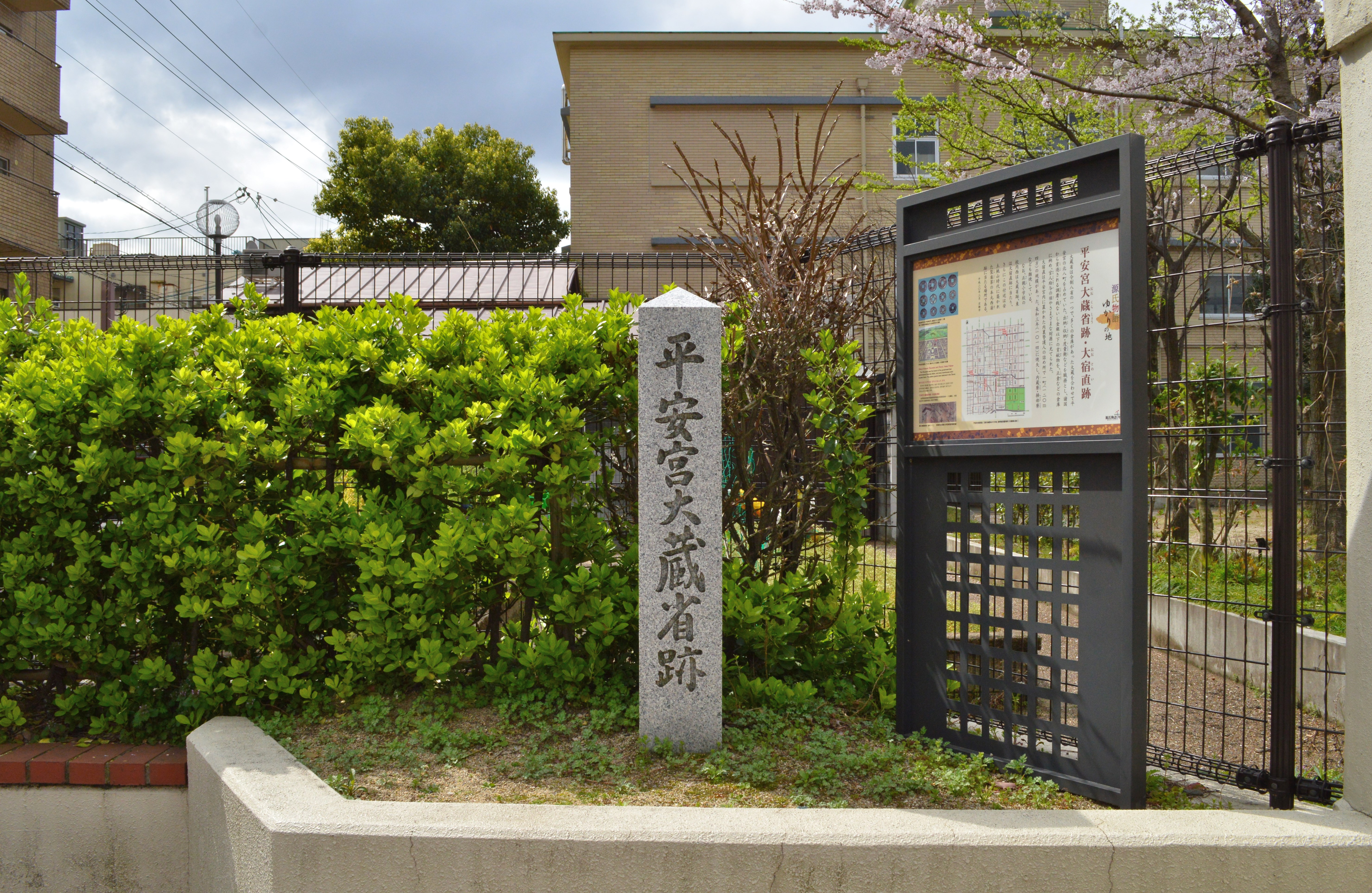 平安京大内裏 大蔵省跡 石碑